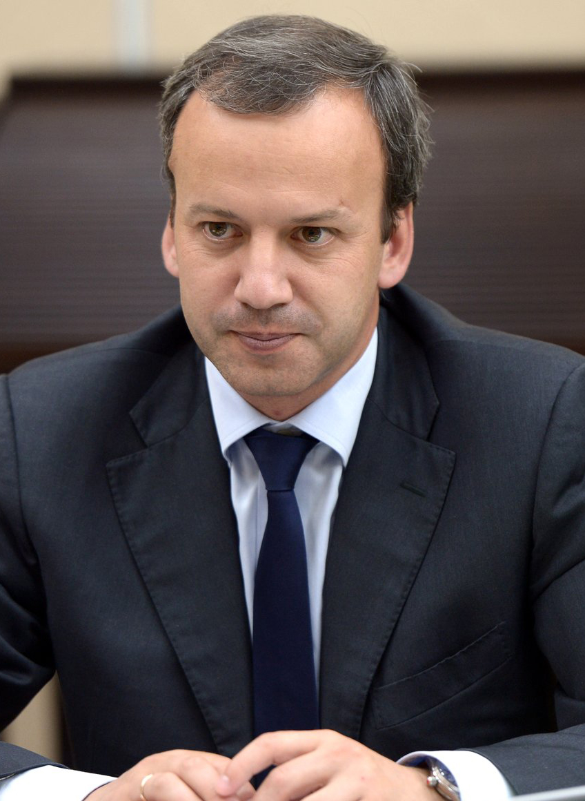 Заместитель Председателя Правительства Аркадий Дворкович